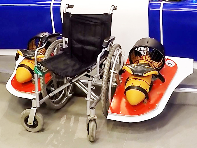 Самоходная подводная инвалидная коляска Скикевича